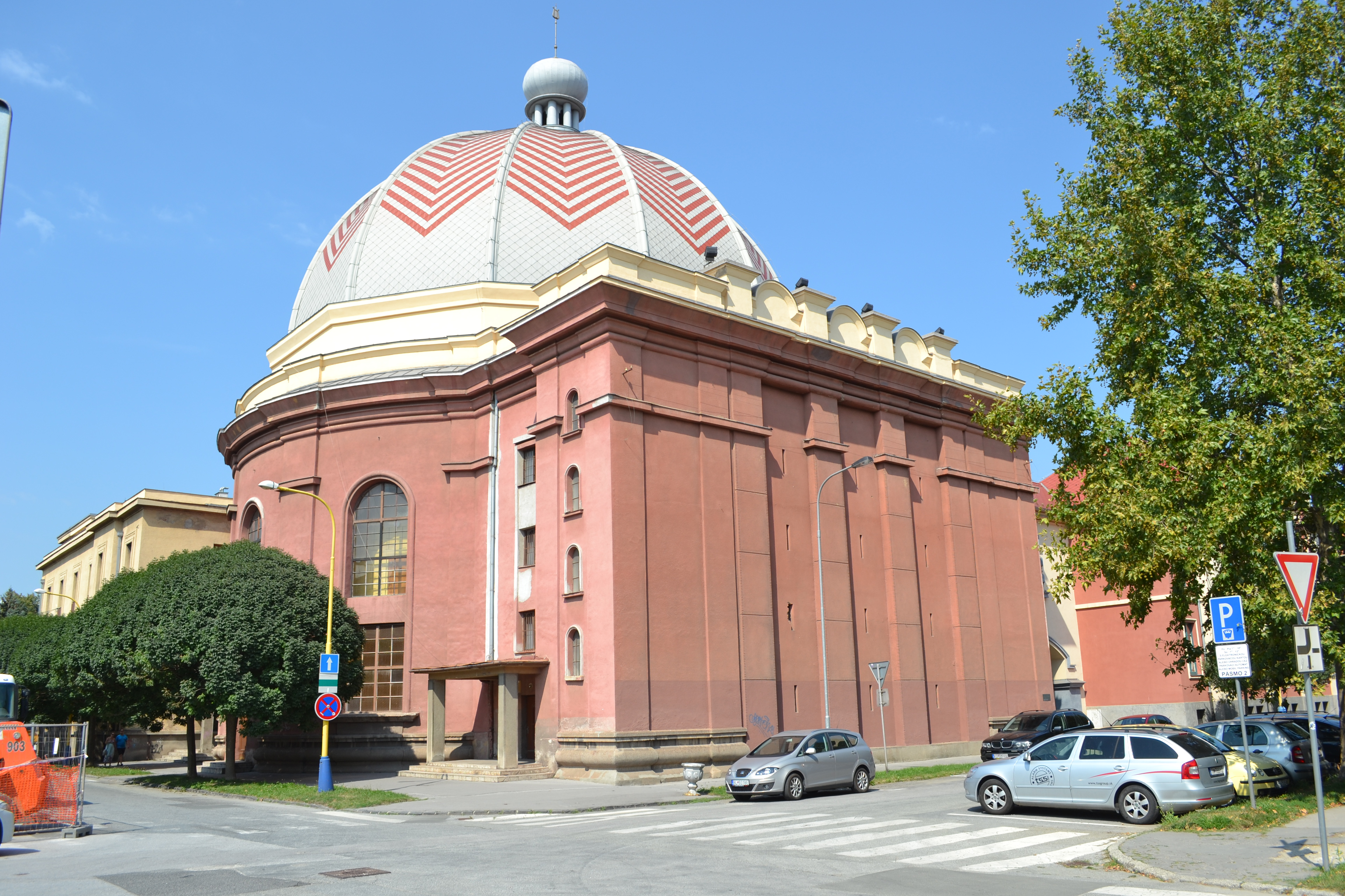 Košická neologická synagóga postavená v roku 1927